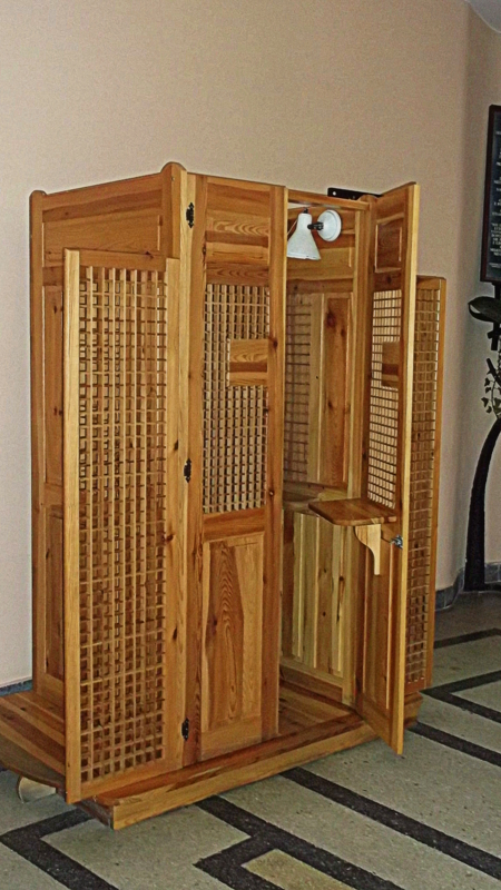 Rewal, kościół pw. Najświętszego Zbawiciela, konfesjonał